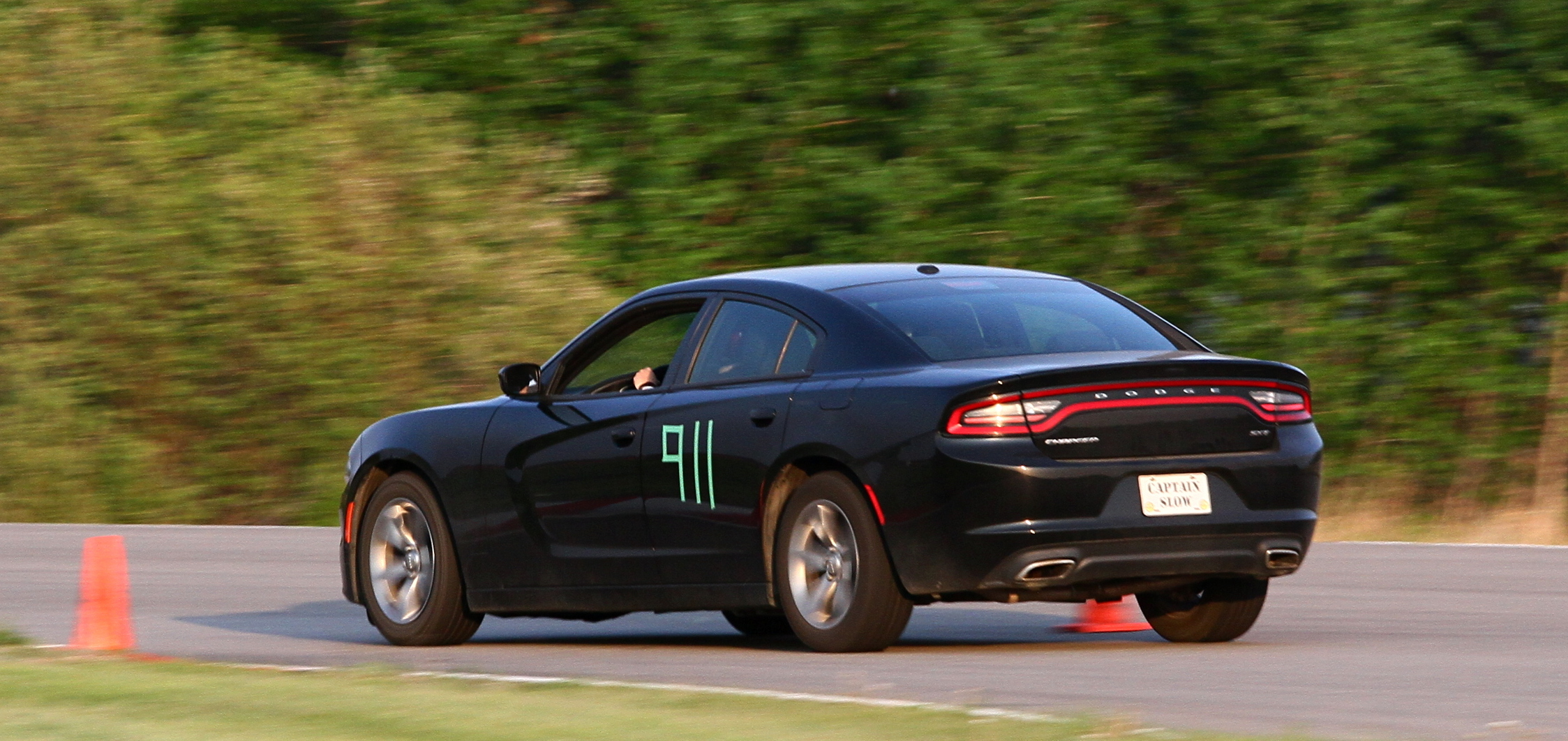 Dodge Charger Autox